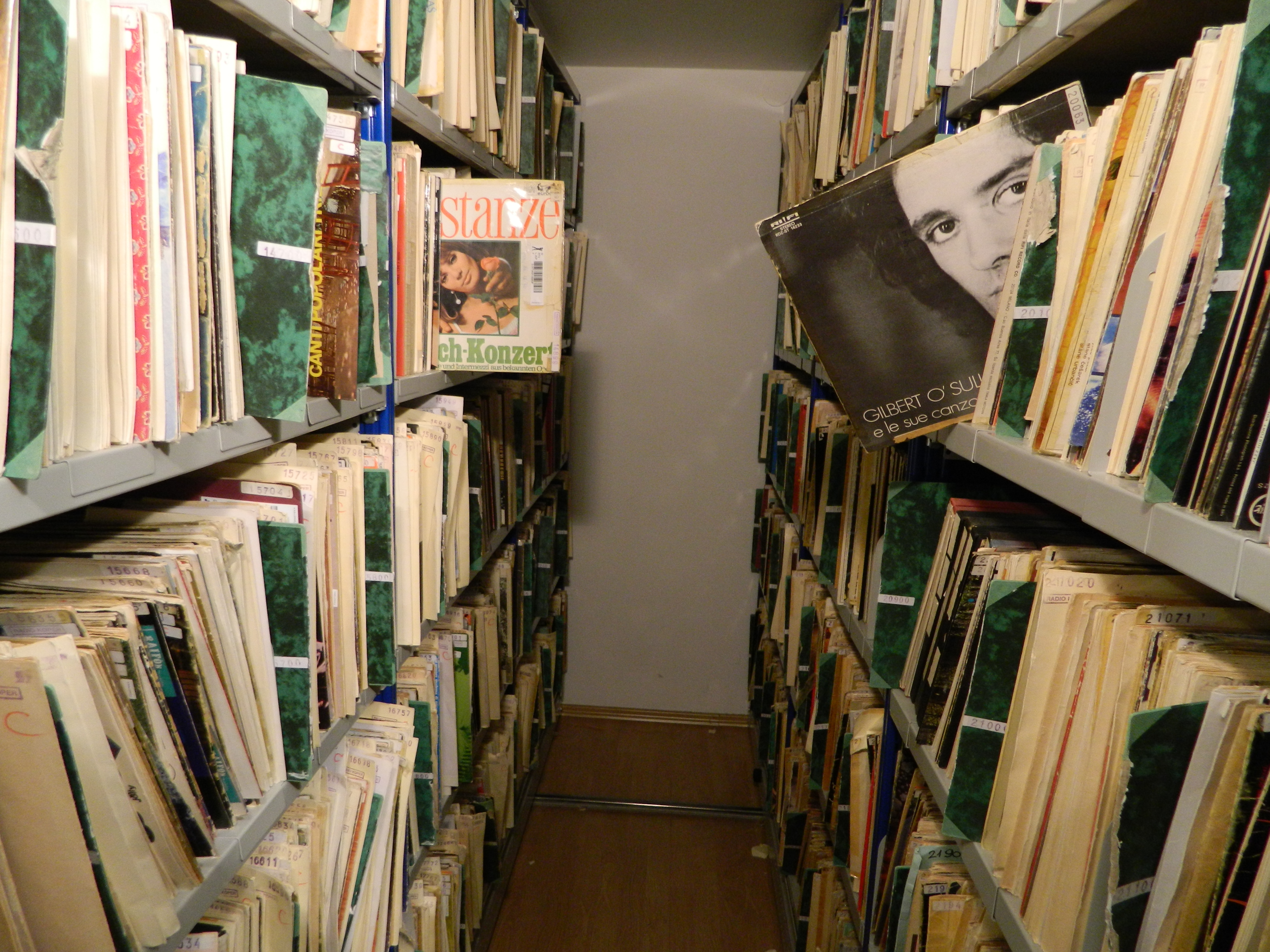 Fonoteka Radia Koper